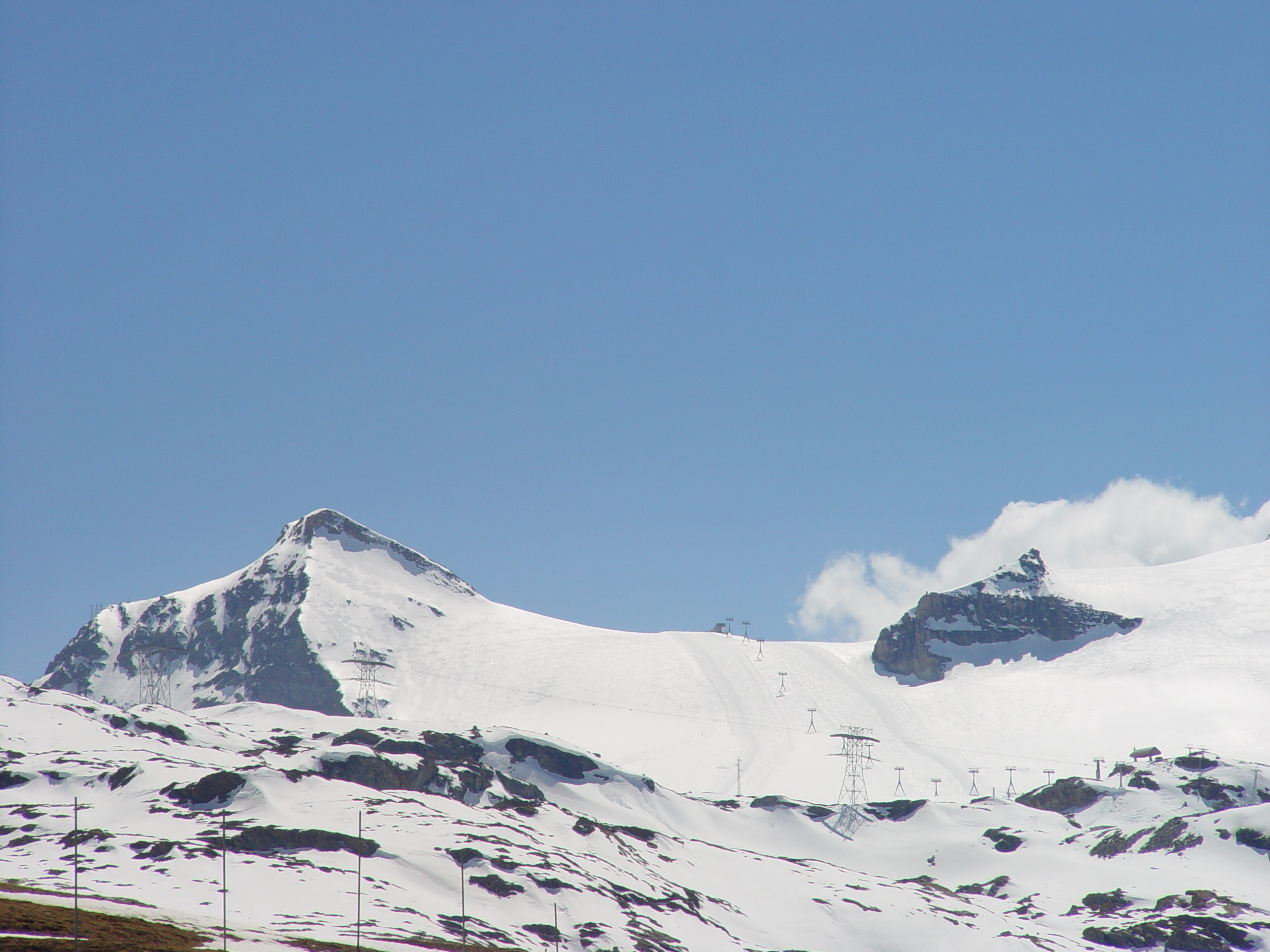 Der Gandegg-Schlepplift zum Furggsattel, links das Theodulhorn, rechts der Ostgrat des Furgghorn